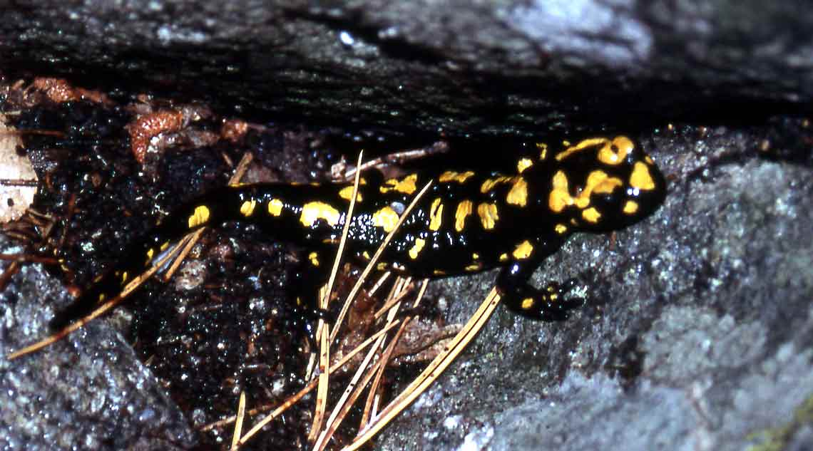 Fire Salamander from Corsica (Salamandra corsica).